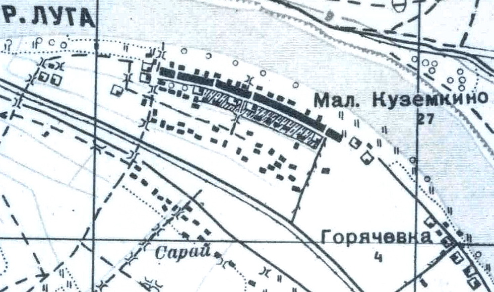 Топографическая карта Ленинградской области, квадрат О-35-21-А-б (Бол. Куземкино), деревня Малое Кузёмкино.